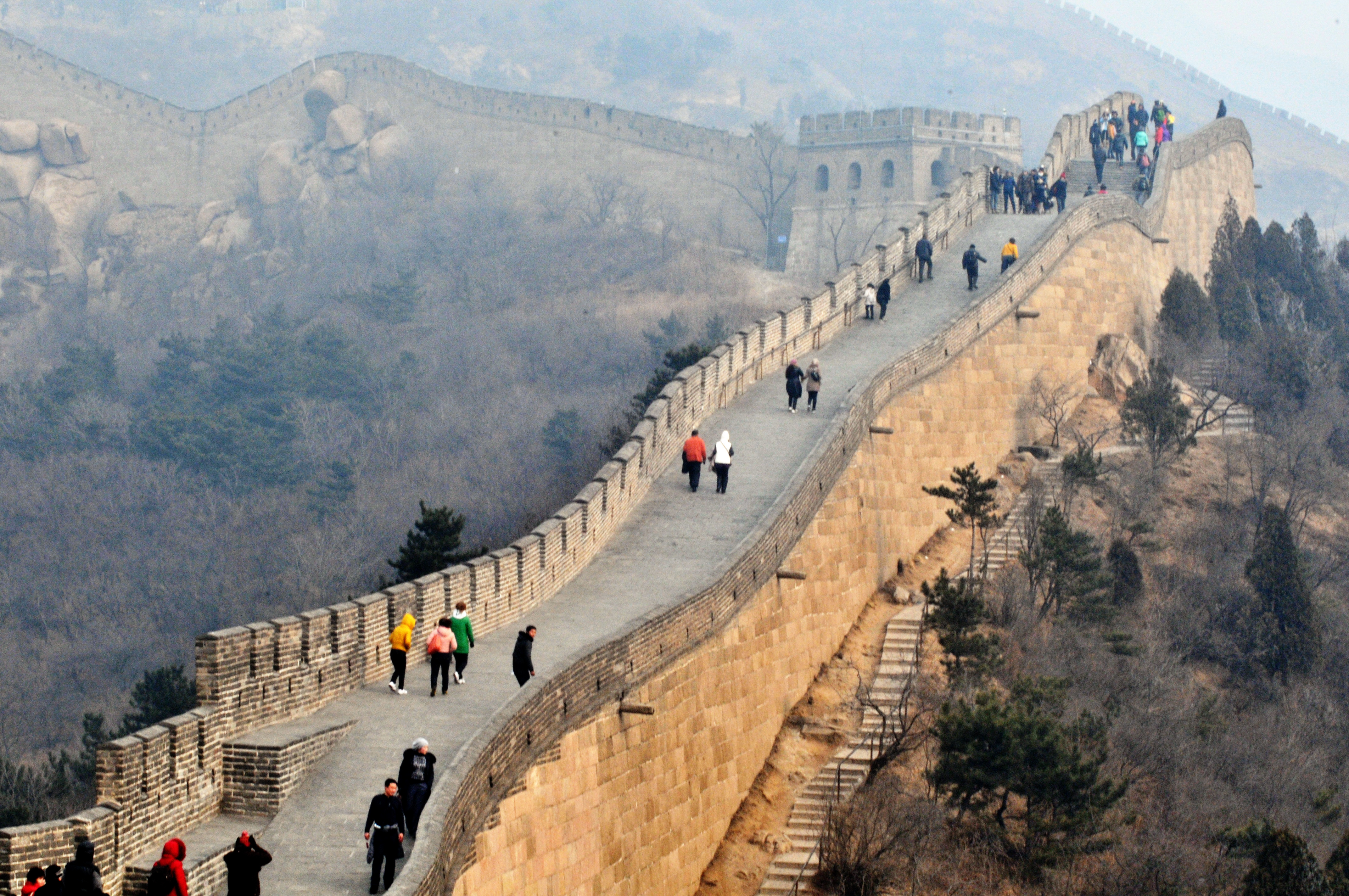 Muraille de Chine Pekin Chine